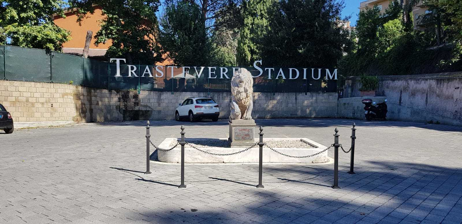 Il parcheggio interno con la statua del leone.